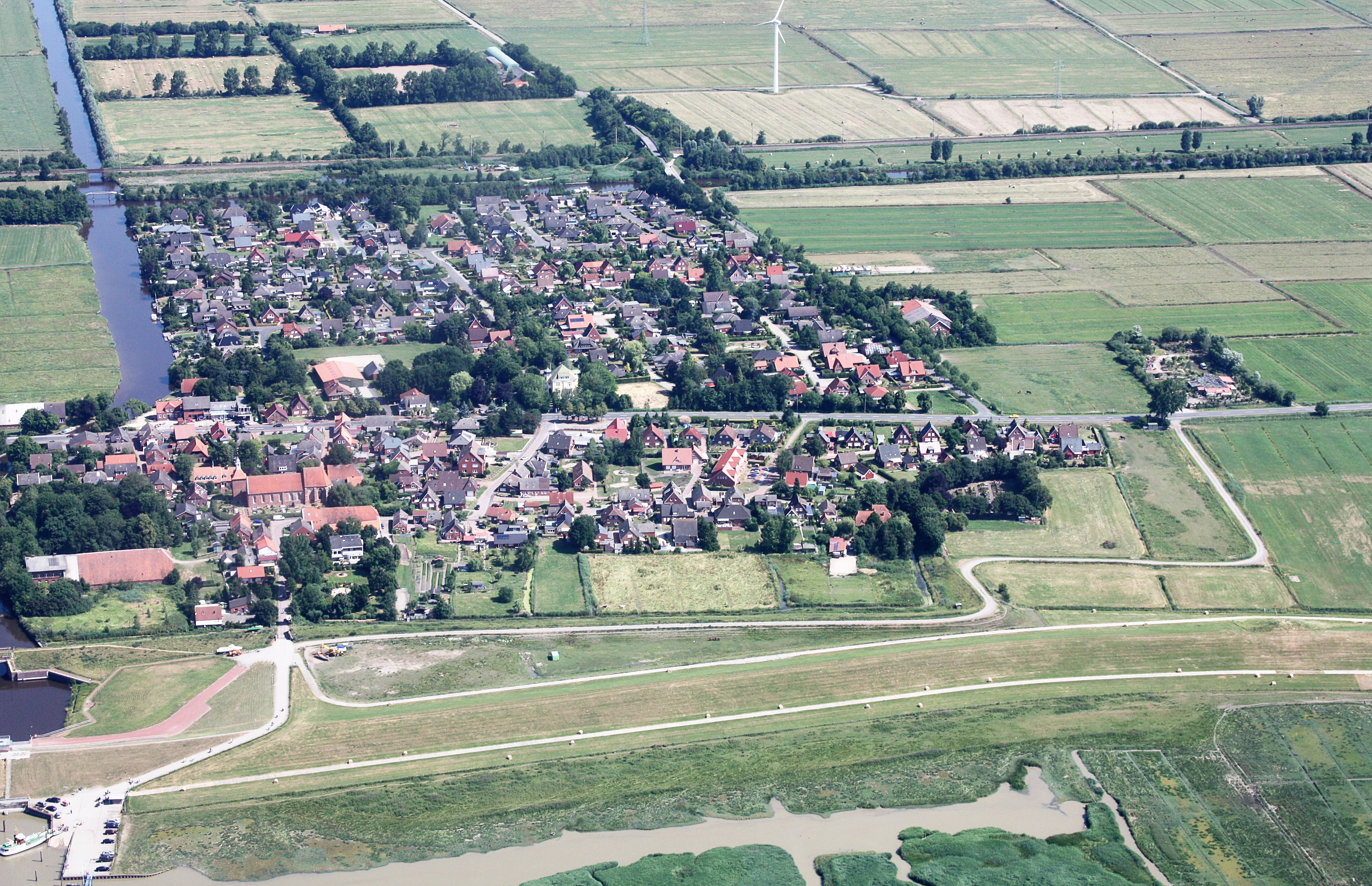 Luftaufnahme; Flug von Leer nach Emden; Flughöhe 1500 ft; Juli 2010; Originalfoto bearbeitet: Tonwertkorrektur und Bild geschärft mit Hochpassfilter